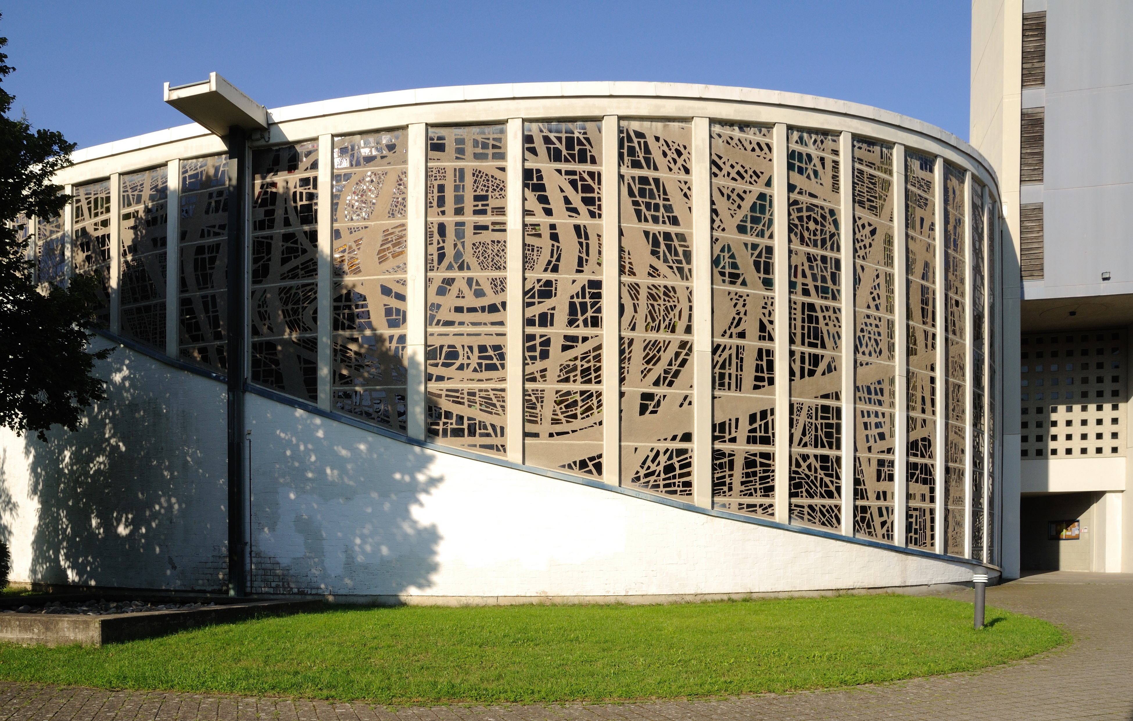 Lörrach: St. Peter (Betonglaswand)